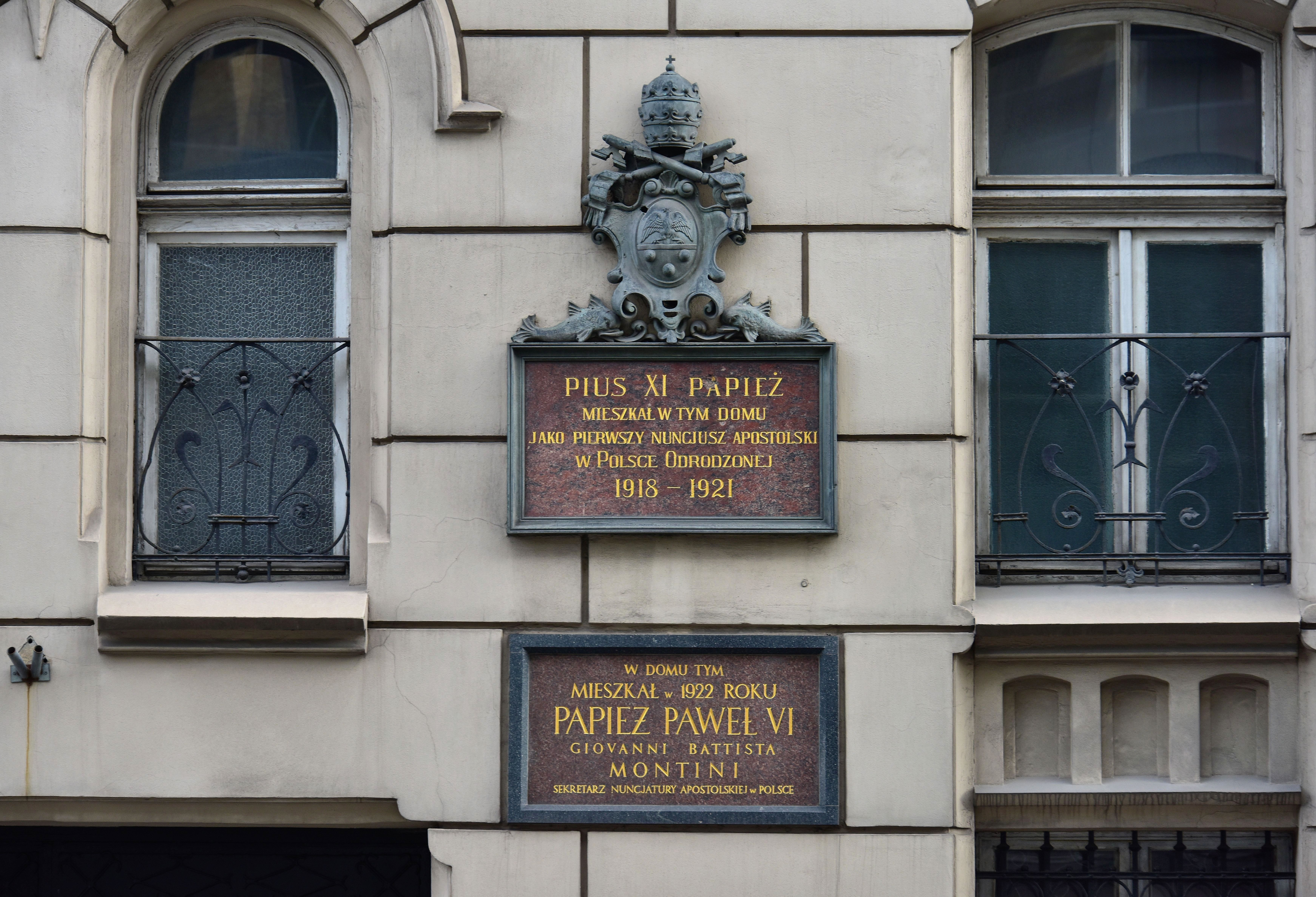 Dom Probostwa parafii św. Aleksandra przy ul. Książęcej 21 w Warszawie